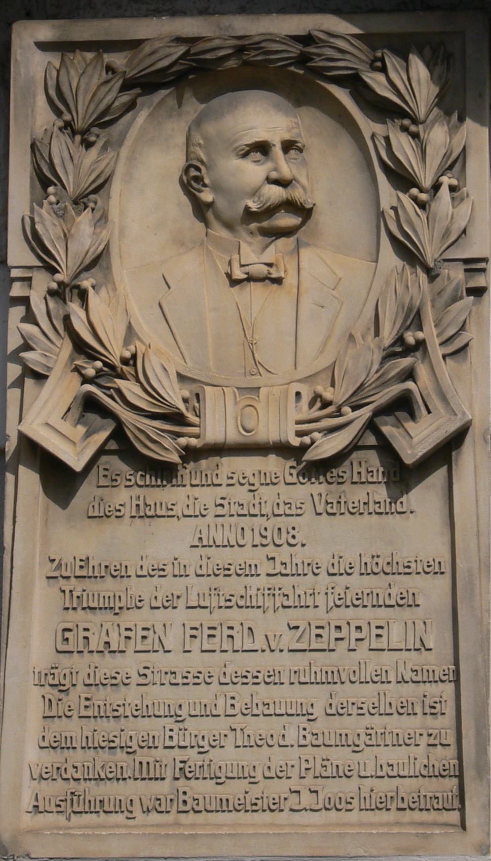 Weingarten (Württemberg), Relief "Ferdinand Graf Zeppelin" in der Zeppelinstraße